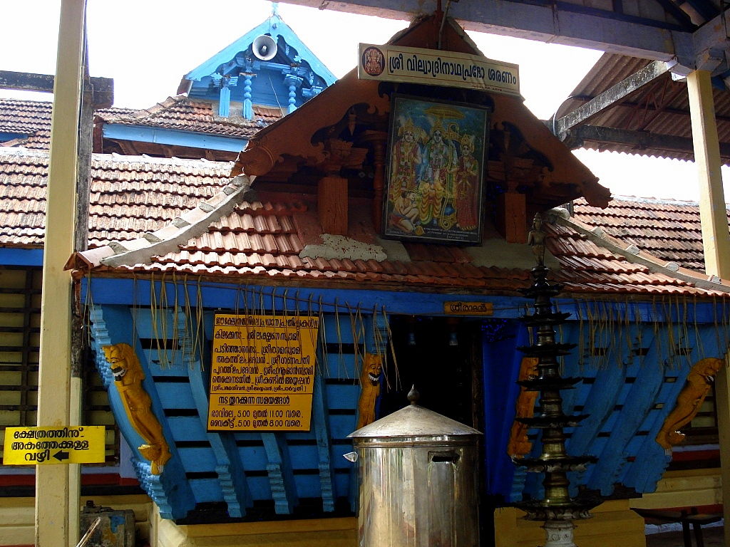 Main temple..